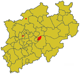 Karte der Grafschaft Limburg (Lenne) und derer Besitzungen